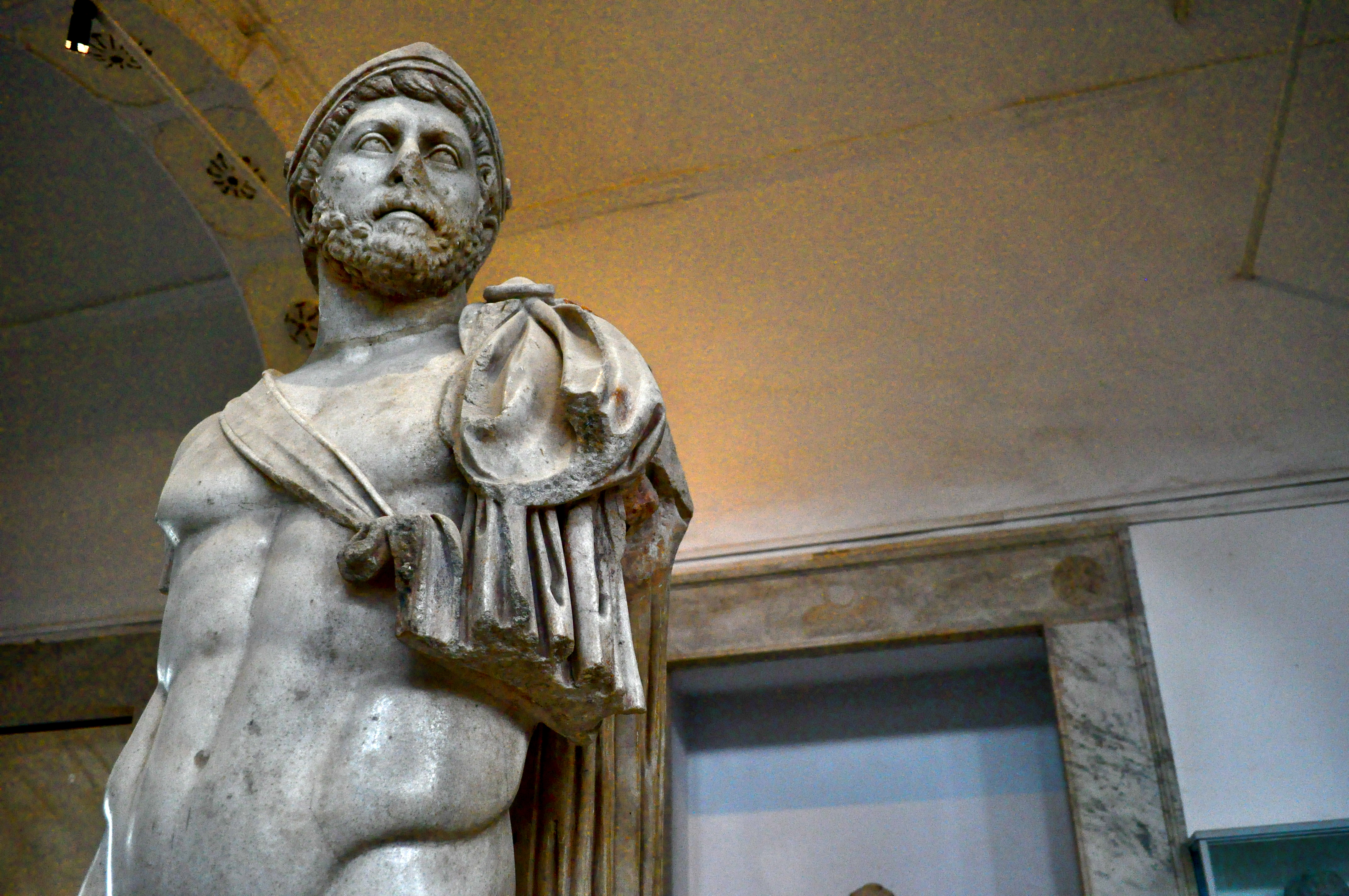 Figura eroizzata dell'imperatore Adriano, al Museo Nazionale del Bardo (Tunisi).